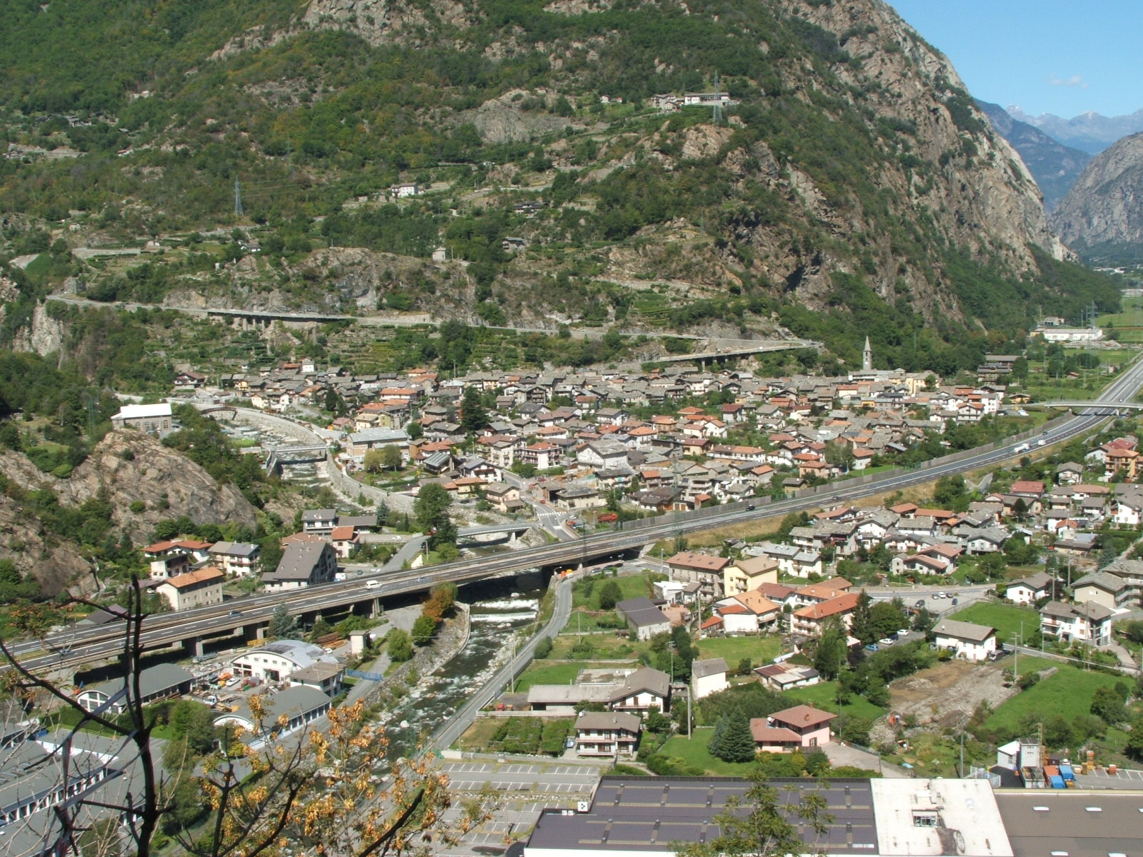 Vall'Aosta - Hône visto dal Forte di Bard e Museo delle Alpi